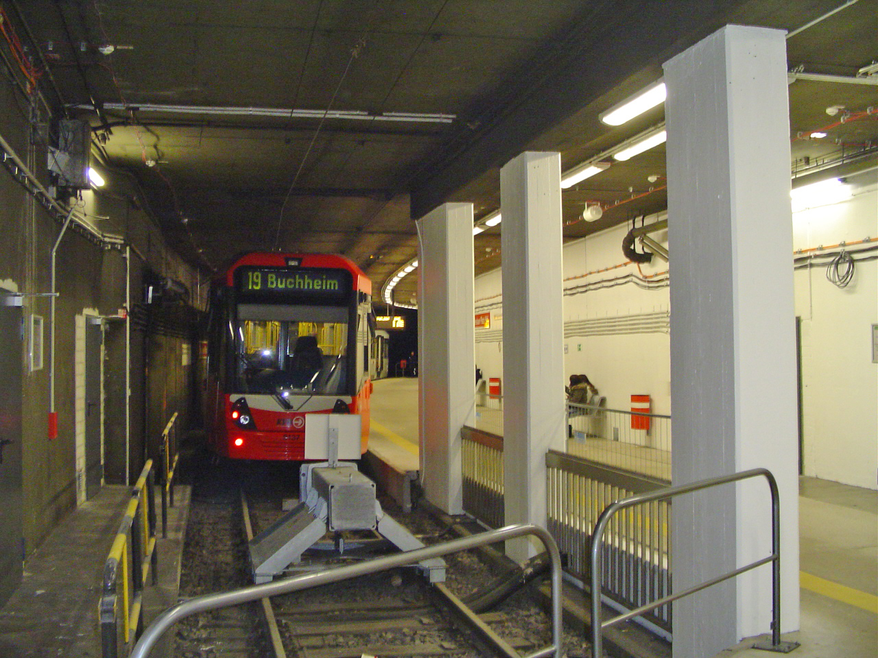 Stadtbahn Köln, Station Breslauer Platz (provisorisch bis Okt. 2007)